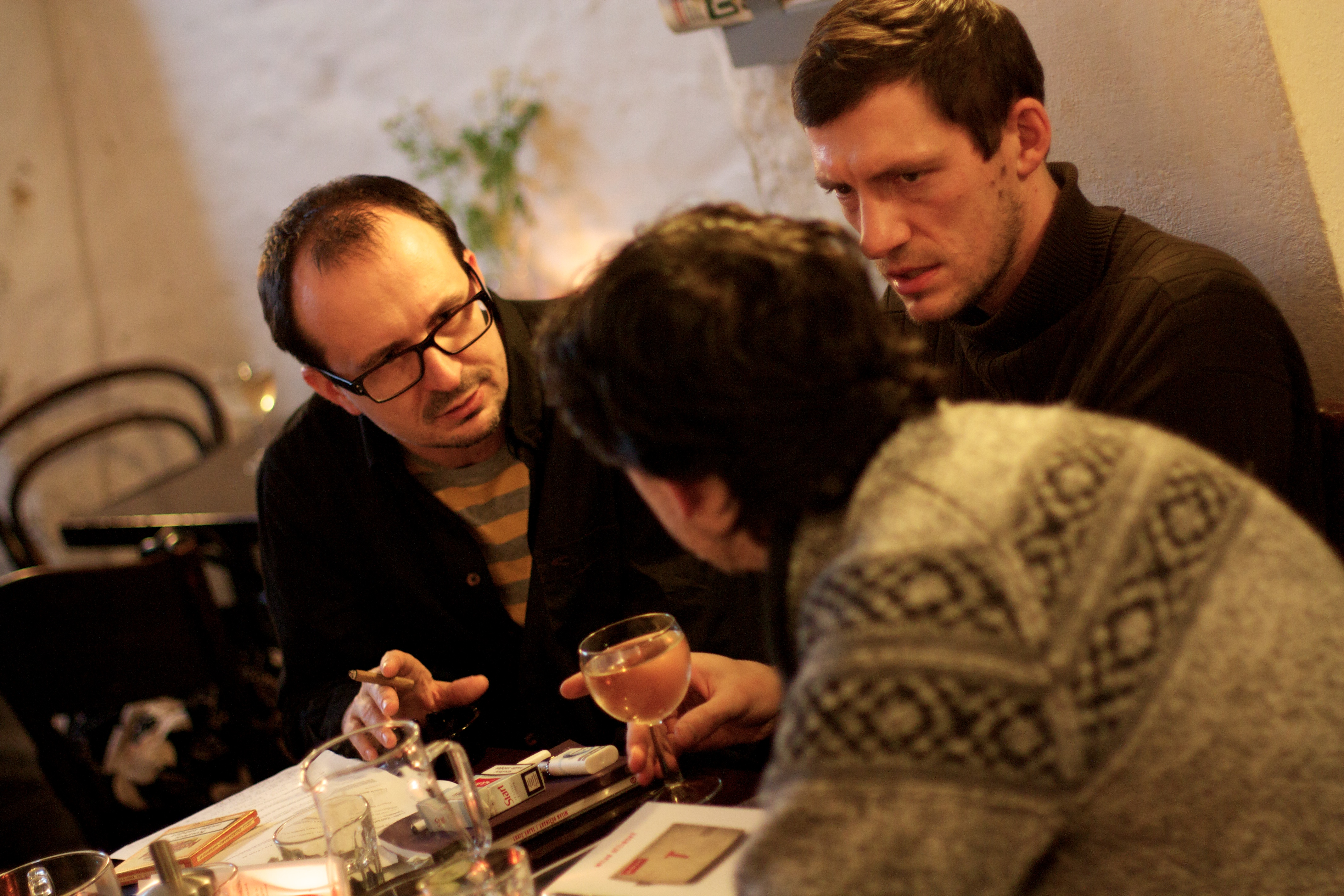 Martin Stöhr / Radek Malý / Milan Děžinský